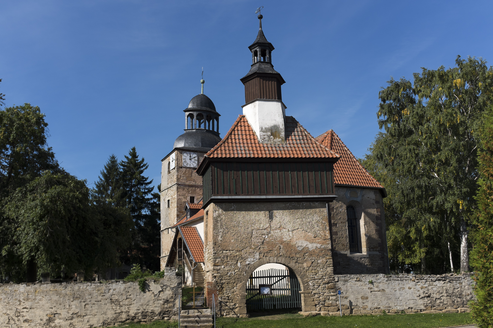 Südostansicht der Kirche St. Crucis in Abtsbessingen